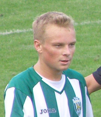 Jurij Furta - ukrainischer Fußballspieler